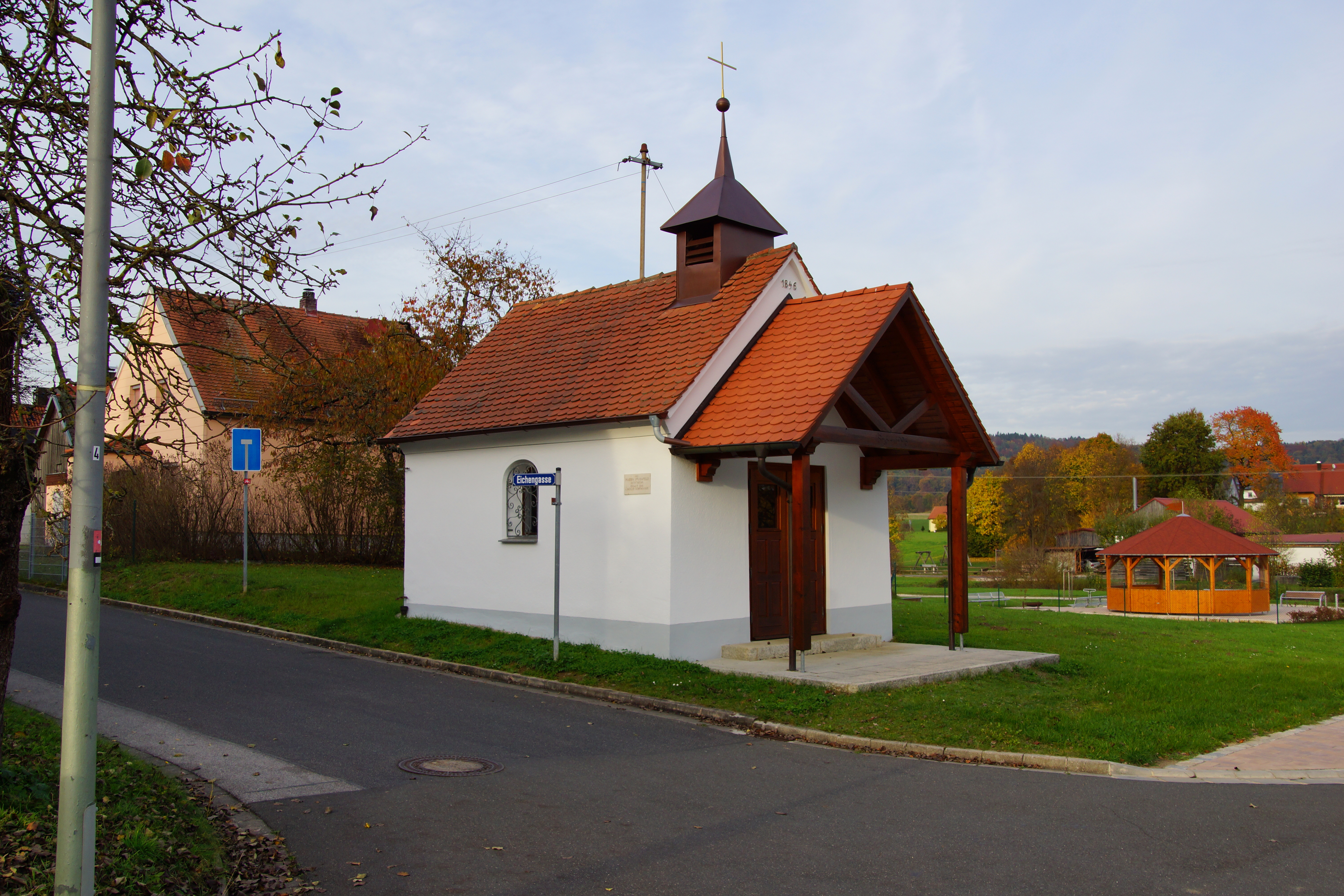 Die Ortskapelle in Richtheim bei Berg in der Oberpfalz